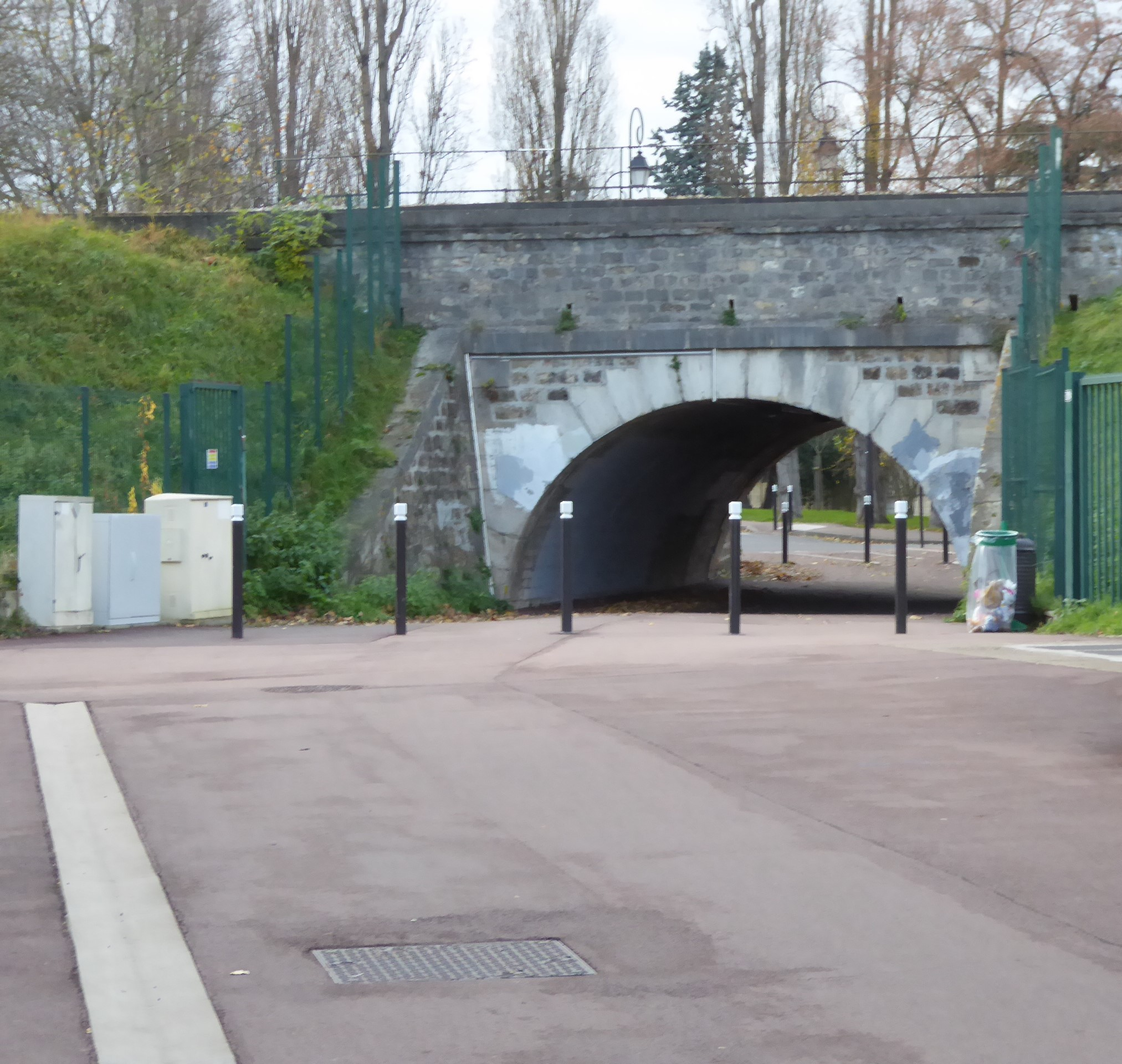 Antony localisation de passage de la Bièvre sous la ligne de Sceaux (RER B)